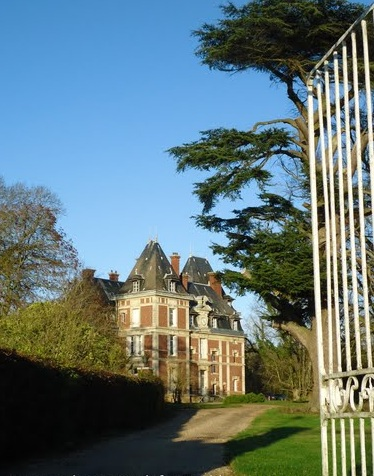 Château de la Chapelle du bois des faulx